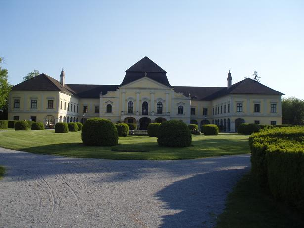 Zámok v Kittsee